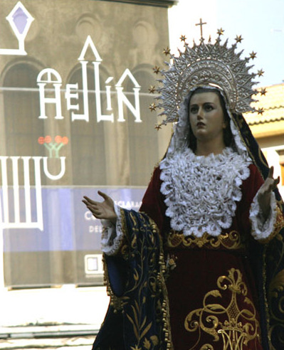 Nuestra Señora de los Dolores